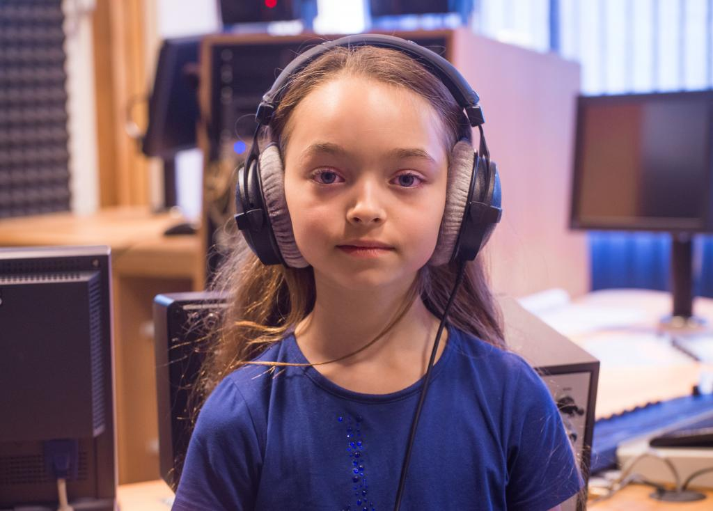 Nastasjia Sojcher dans un studio de radio